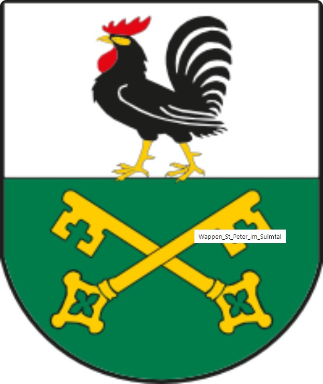 Wappen der Gemeinde Sankt Peter im Sulmtal, Steiermark